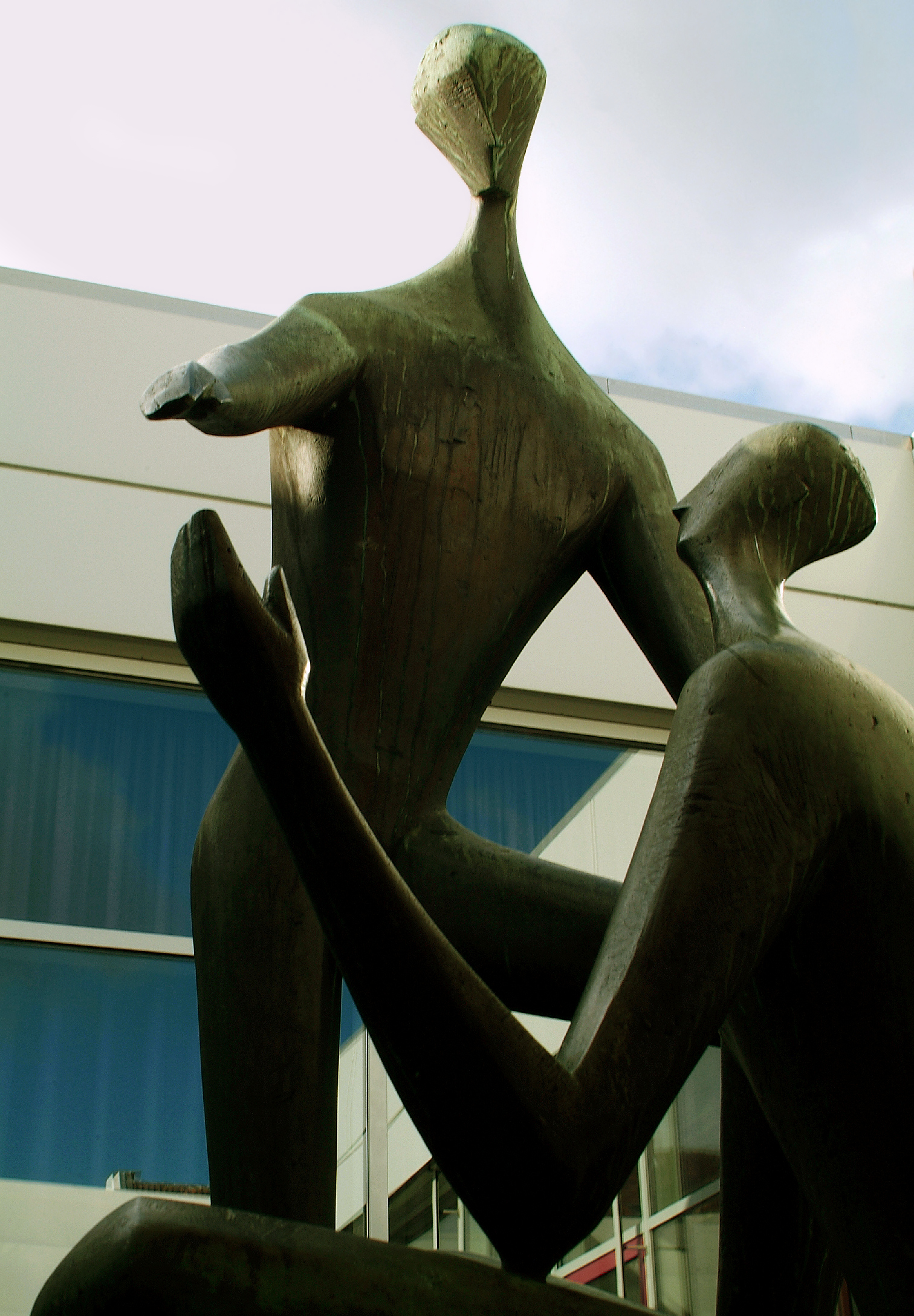 Die Skulptur Das Gespräch von Maria Becke Rausch; 3/4-Ansicht von rechts unten (da die Plastik von einem Zeltaufbau verstellt war, war eine größere Ansicht zum Zeitpunkt der Aufnahme nicht möglich. Maria Becke-Rausch (1923–) DescriptionGerman sculptorDate of birth 1923 Location of birth Leipzig Work location Leipzig; Dresden; Xanten; Hanover; GrazAuthority control : Q1895700 VIAF: 25546347 GND: 124796796 creator QS:P170,Q1895700